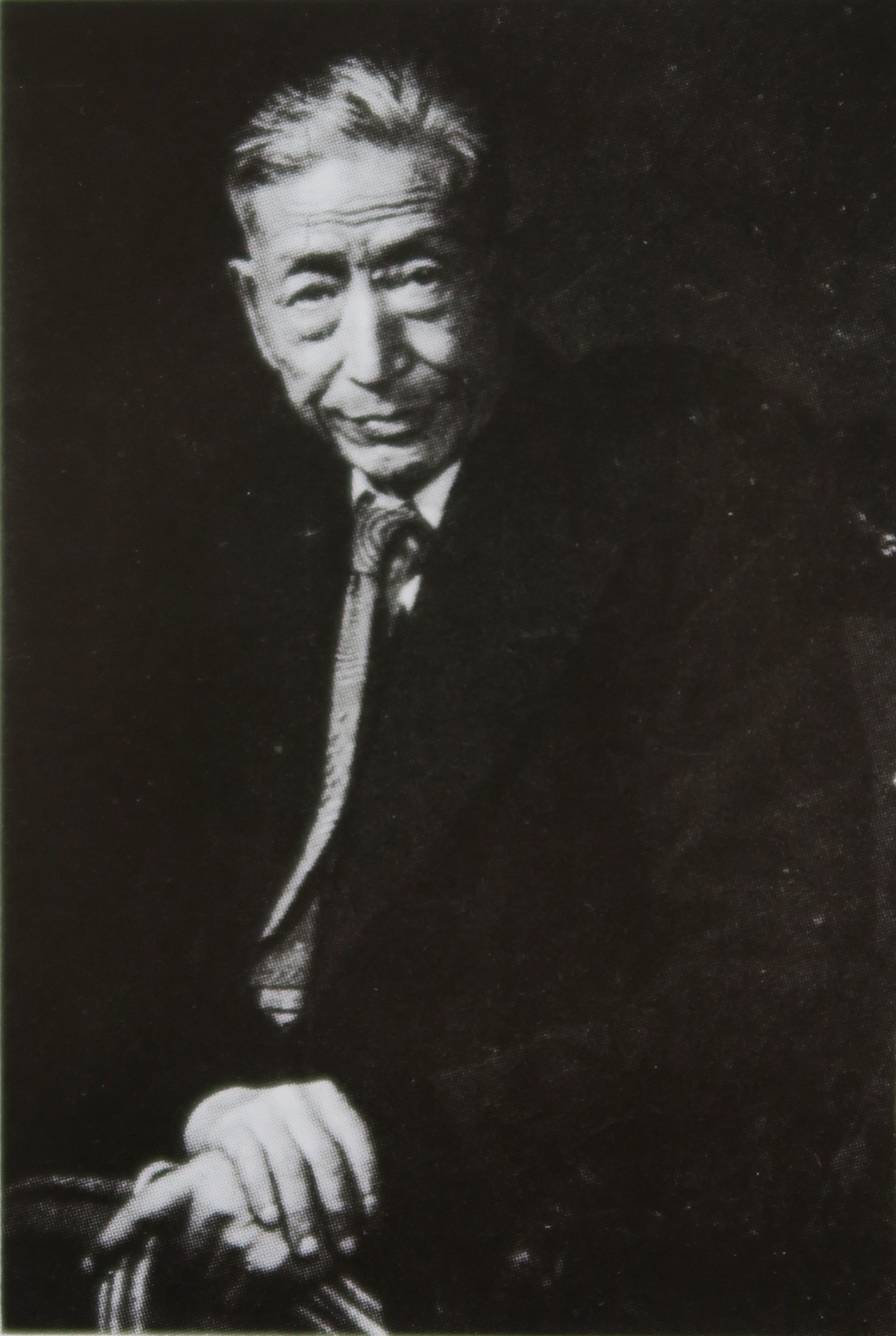 李鐵夫1930年代攝於紐約